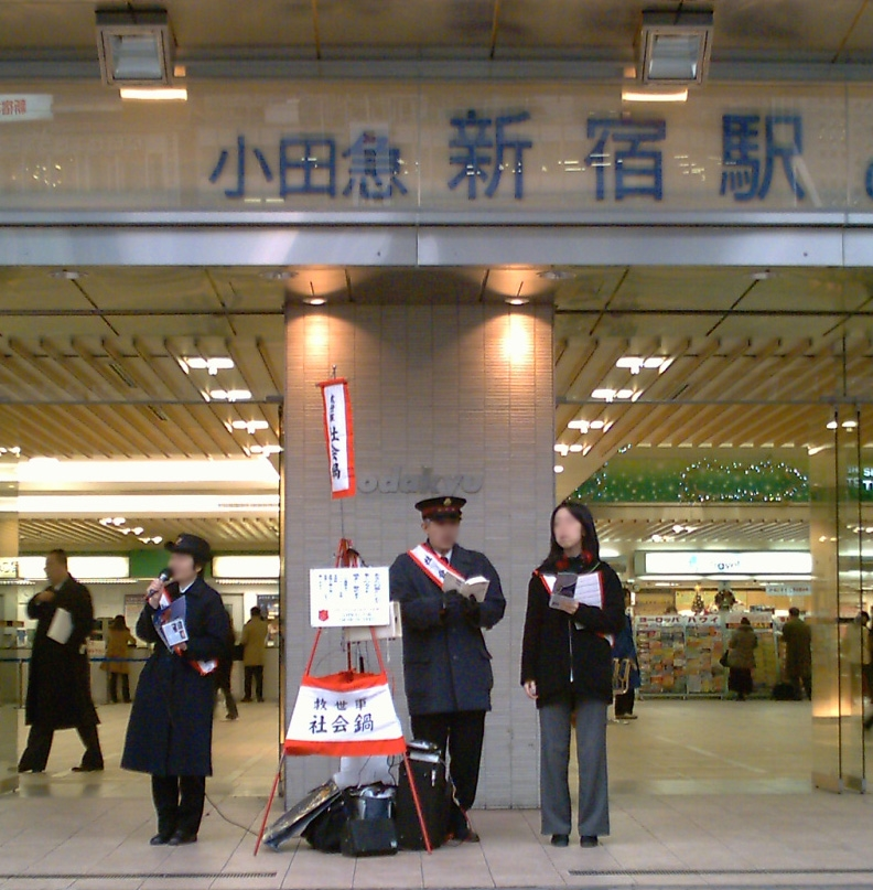 Salvation_Army Shinjuku, Tokyo